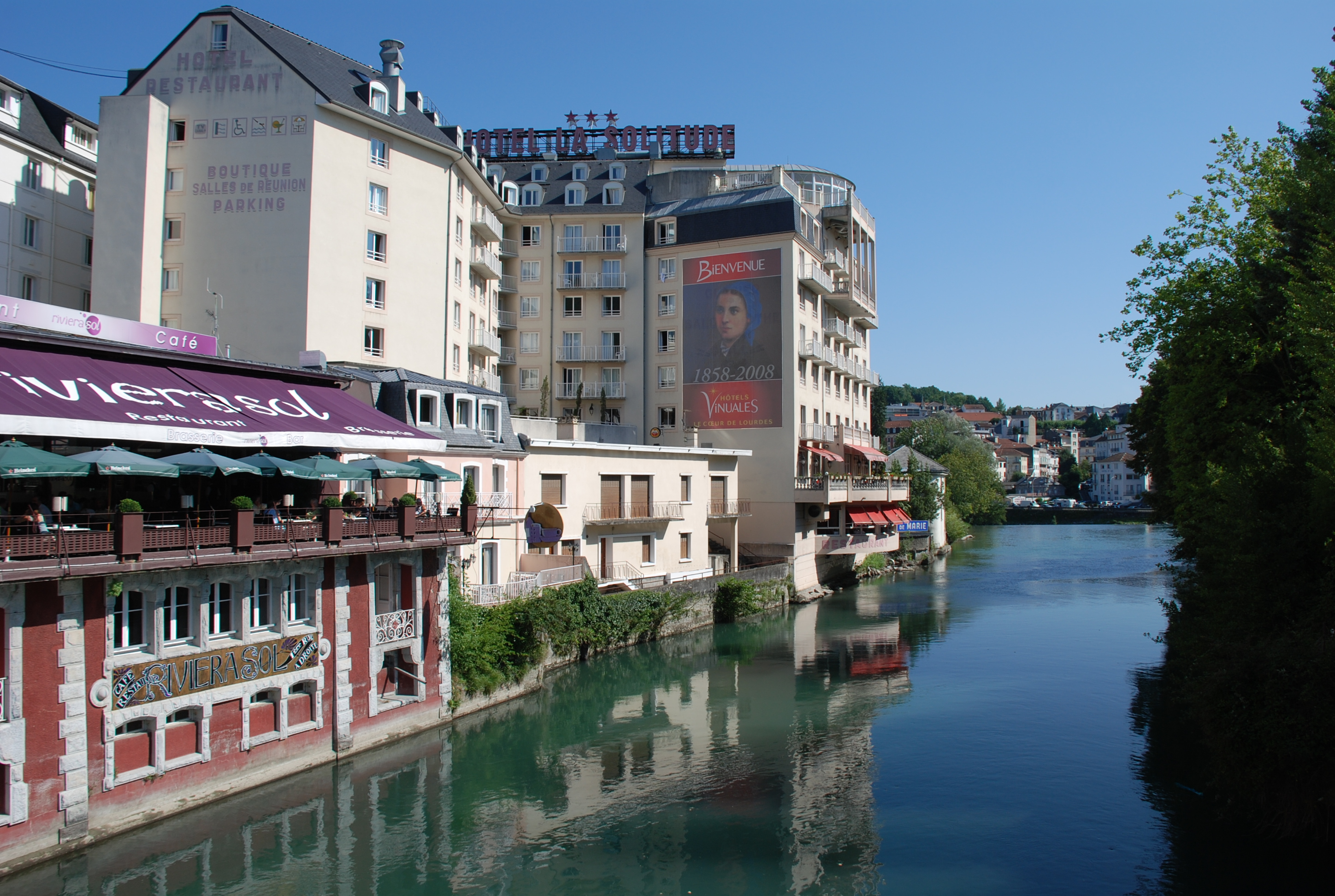 Lourdes (Hautes-Pyrénées, France) - Hotels et Gave de Pau.